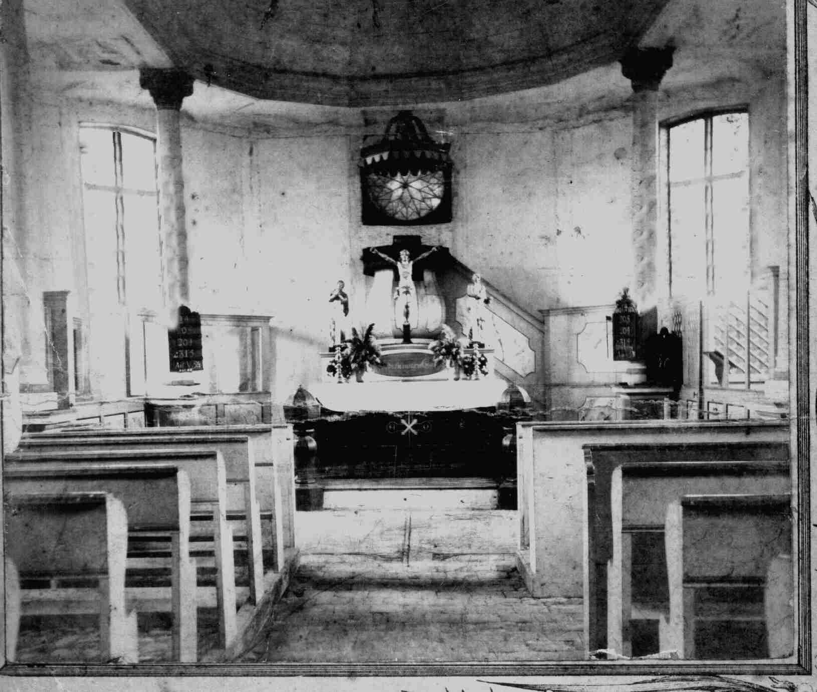 Die Kirche Riebrau - Innanansicht 1905